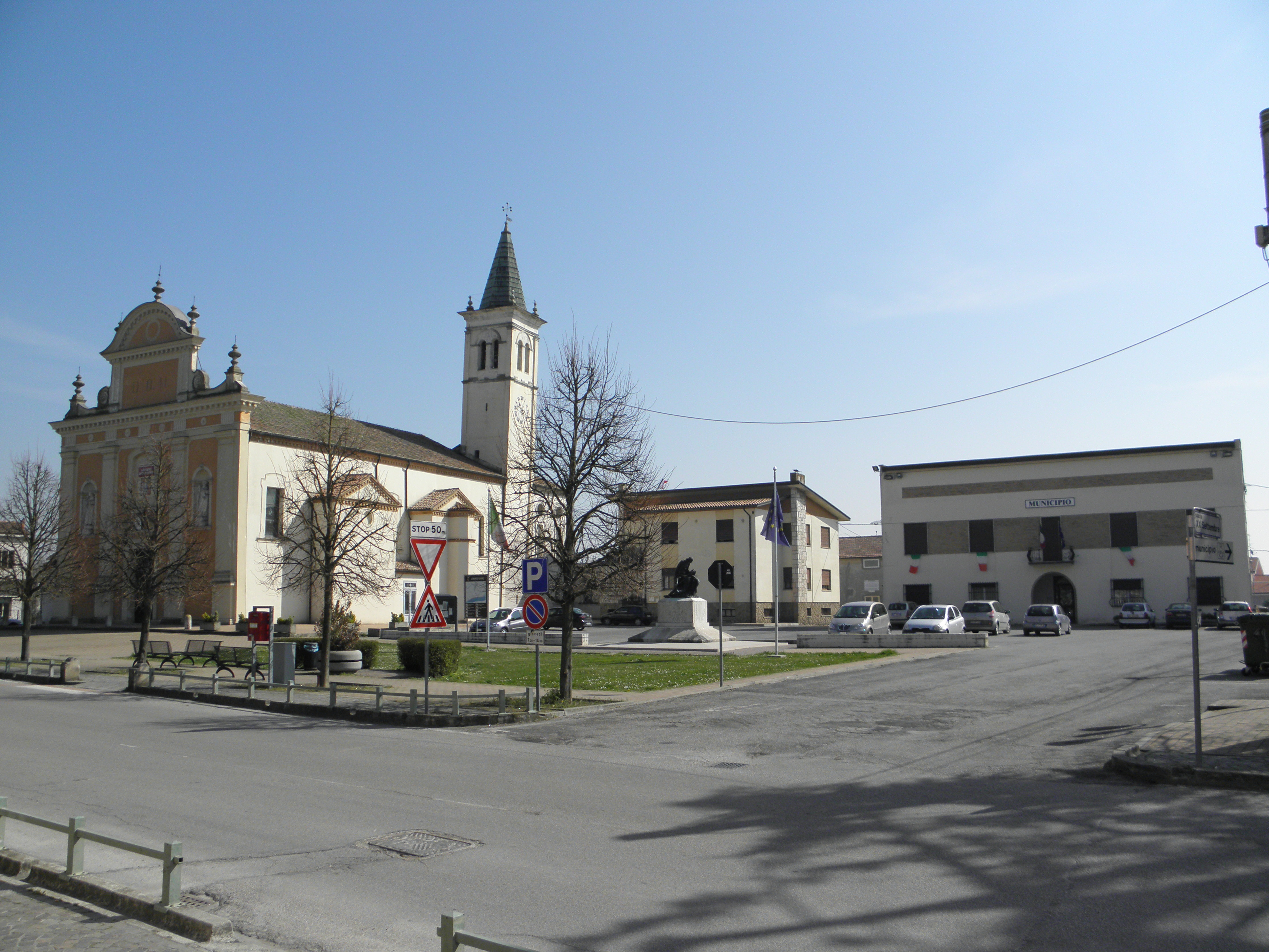 Canaro, Via Roma: vista della parrocchiale di Santa Sofia e del municipio.